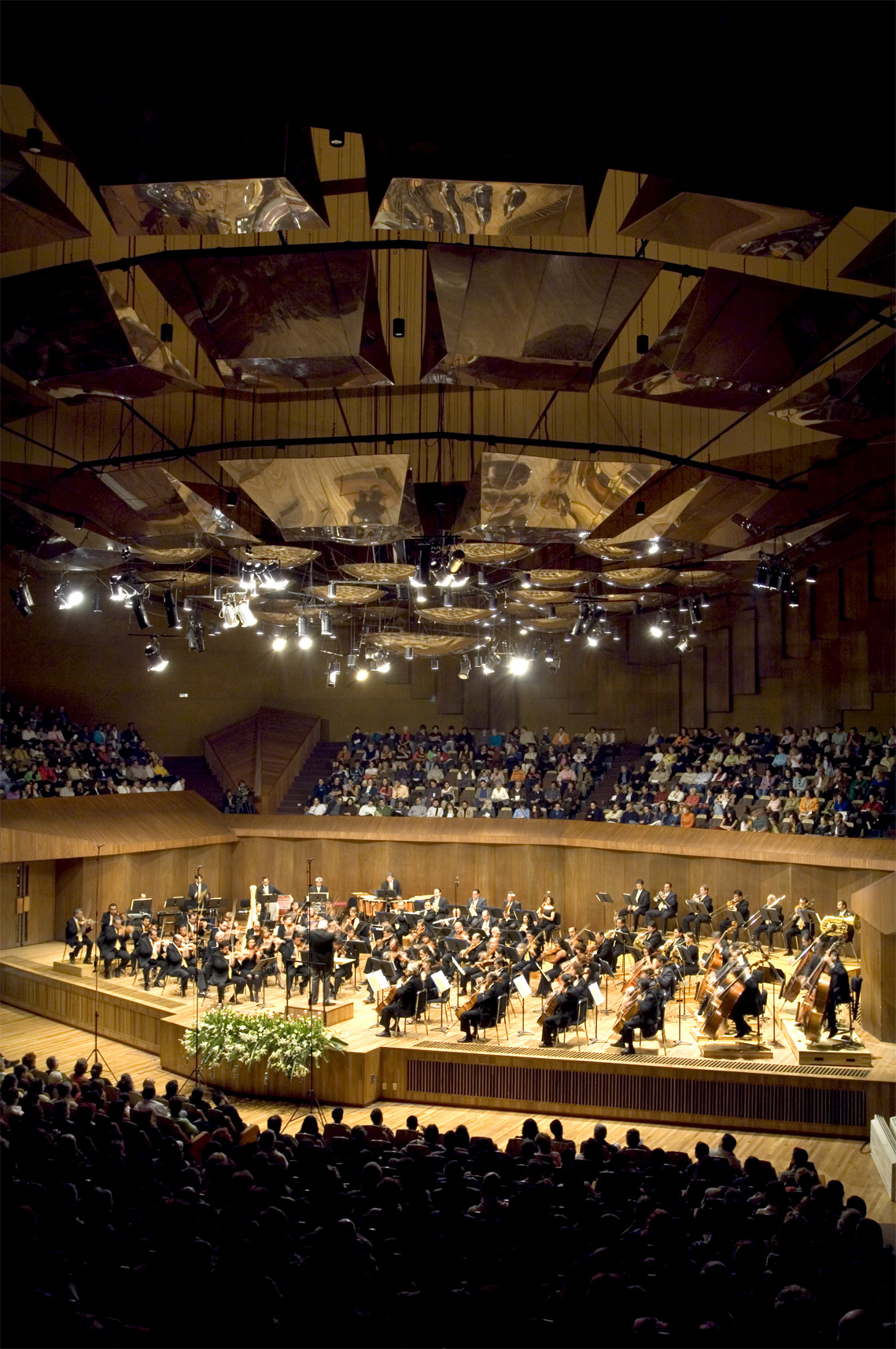 OFUNAM, Segunda Temporada 2008